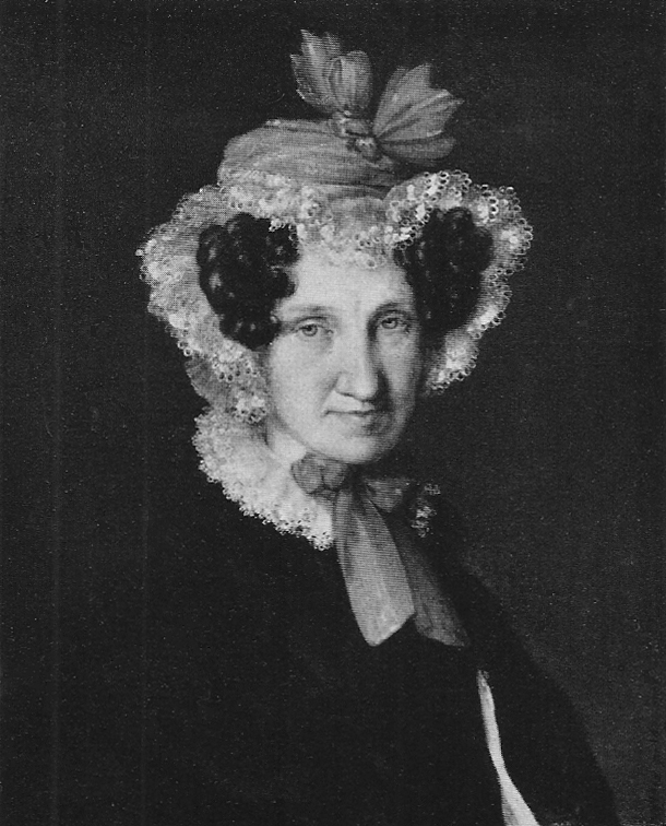 Sophie Keller geb. Doertenbach [Kaufmannsgattin] (Elfenbeinminiatur 140×110 mm)